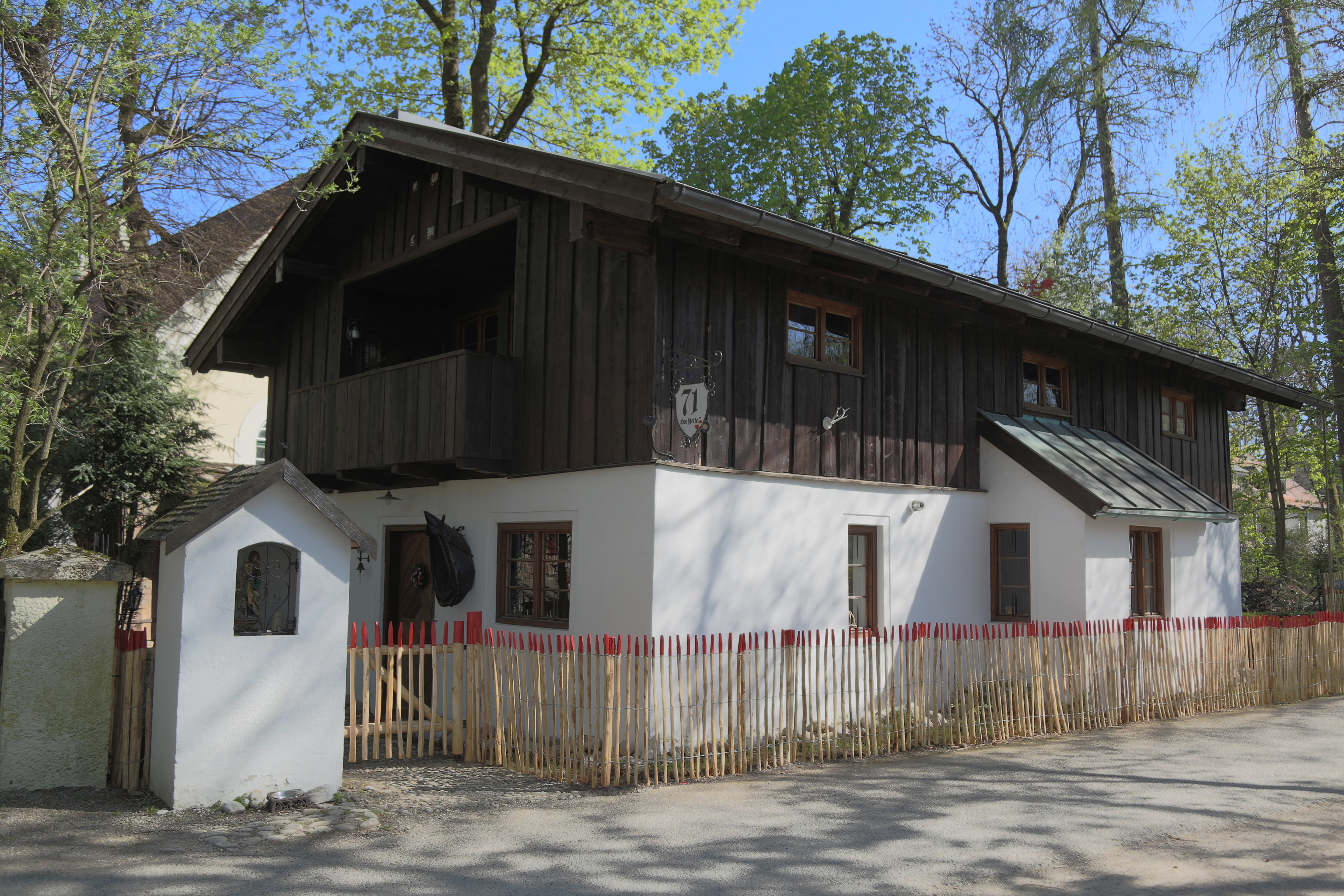 Hochleite 71 im Münchner Stadtteil Harlaching, ein Nebengebäude des Gutshofs Menterschwaige